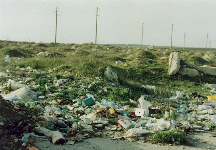 Garbage